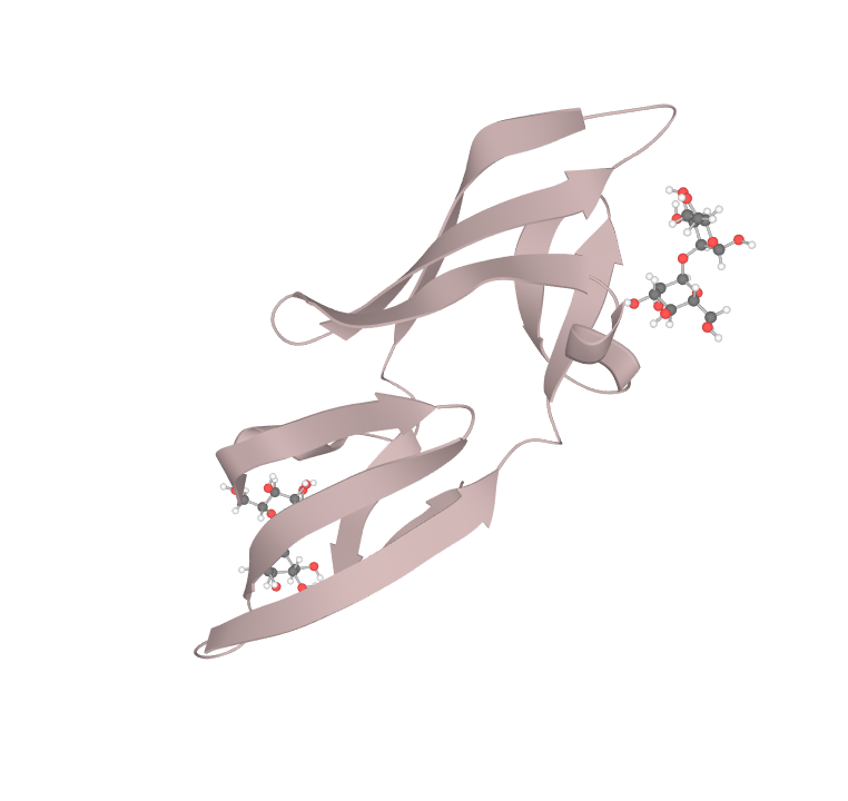 Estructura de la cianovirina-N, on es poden apreciar les làmines-β i els llocs d'anclatge de carbohidrats en extrems oposats de la proteïna